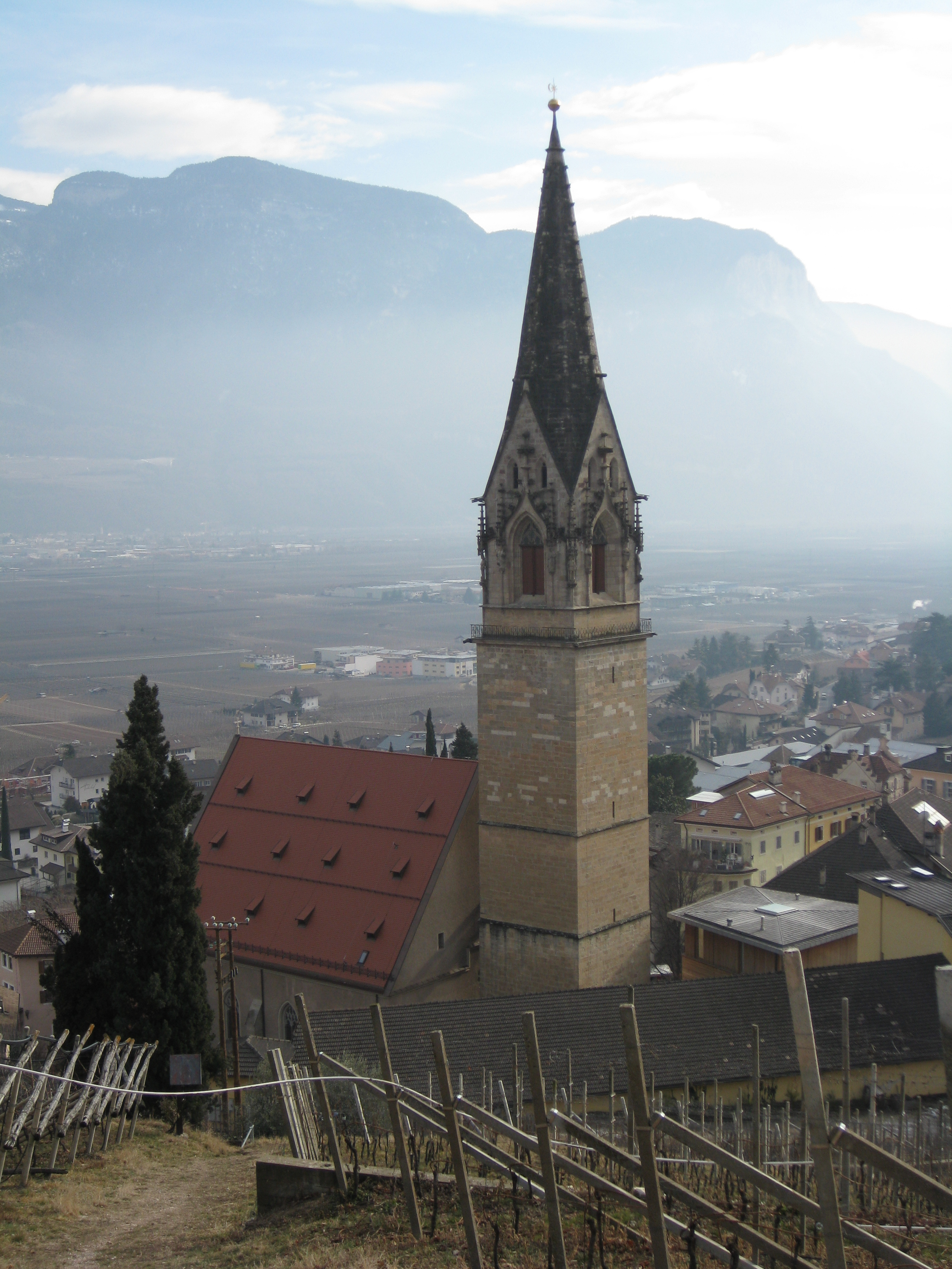 Pfarrkirche St. Quirikus und Julitta in Tramin